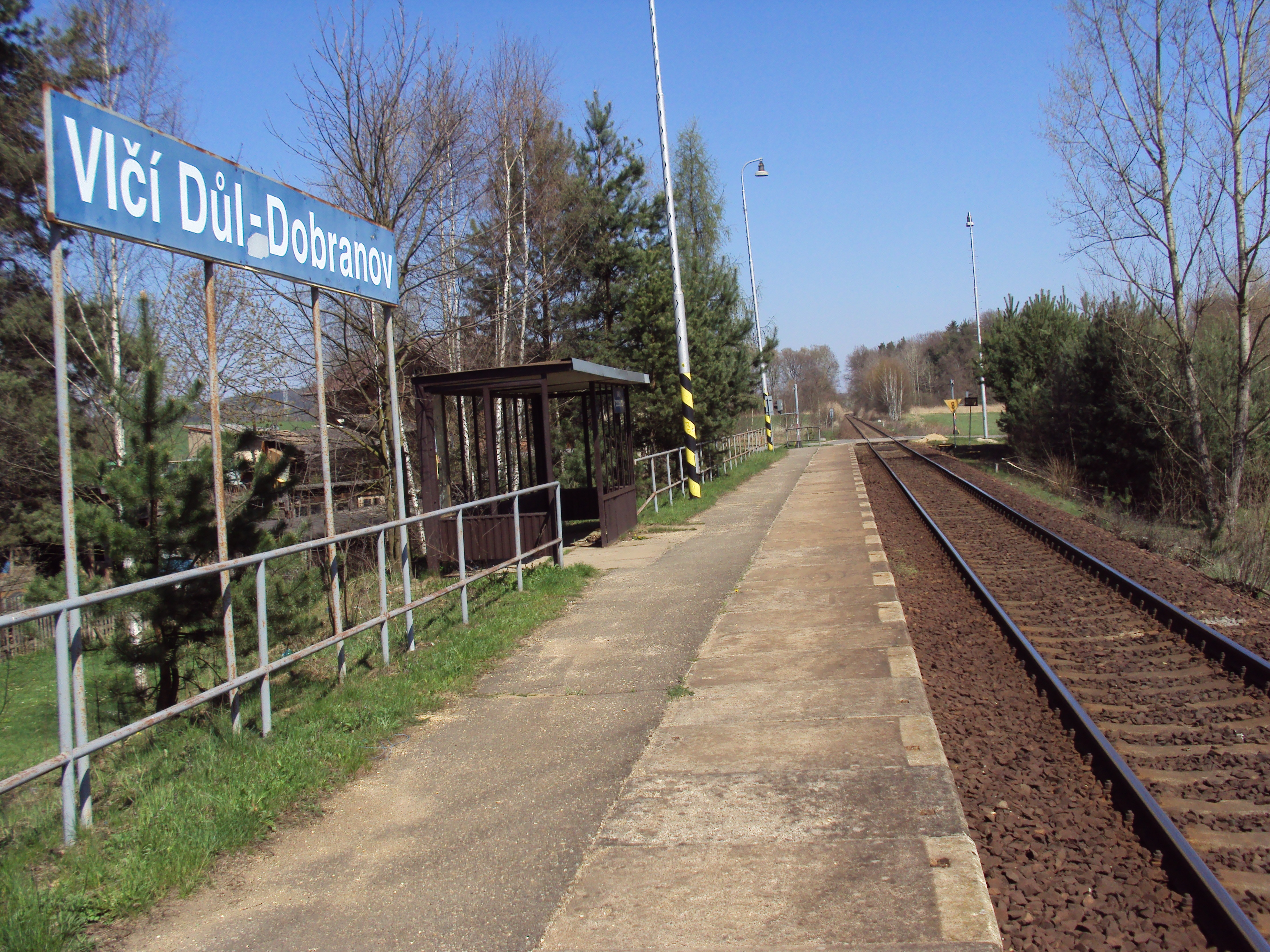 Vlaková zastávka Vlčí Důl-Dobranov, trať Česká Lípa - Liberec, je v části obce Vítkov (Česká Lípa)